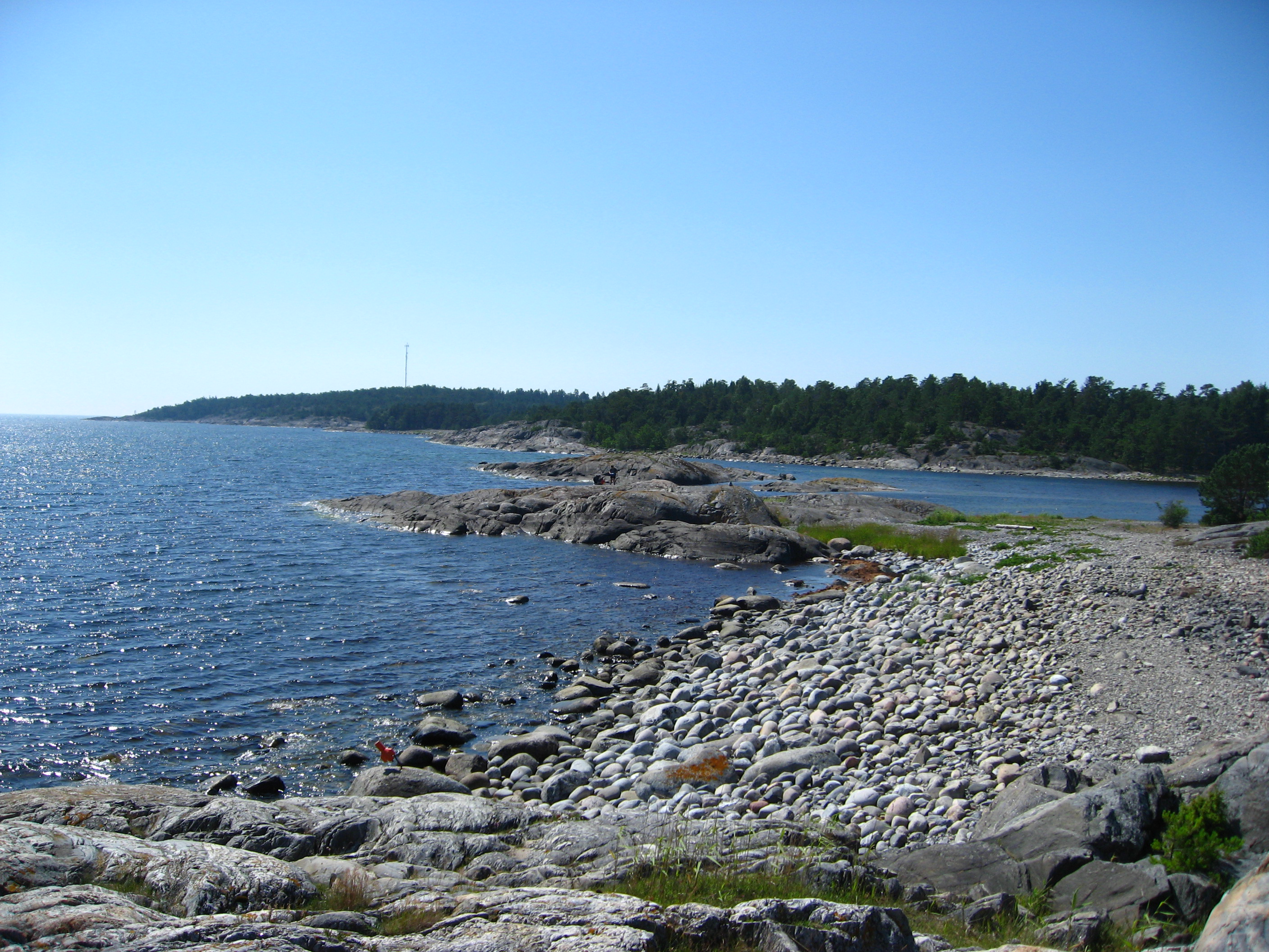 Östra Nåttarö, strax norr om Skarsand (Lillsand)Stockholms skärgård, Sverige